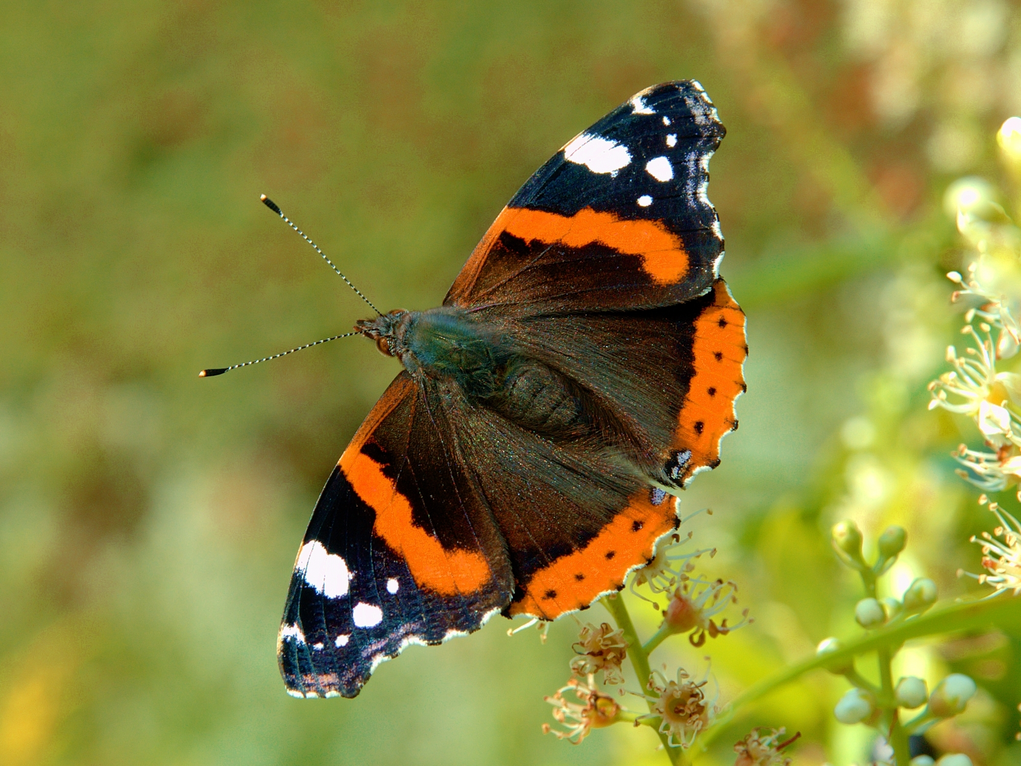 Vanessa atalanta (Linnaeus, 1758) Butterfly (Belgium Hamois)